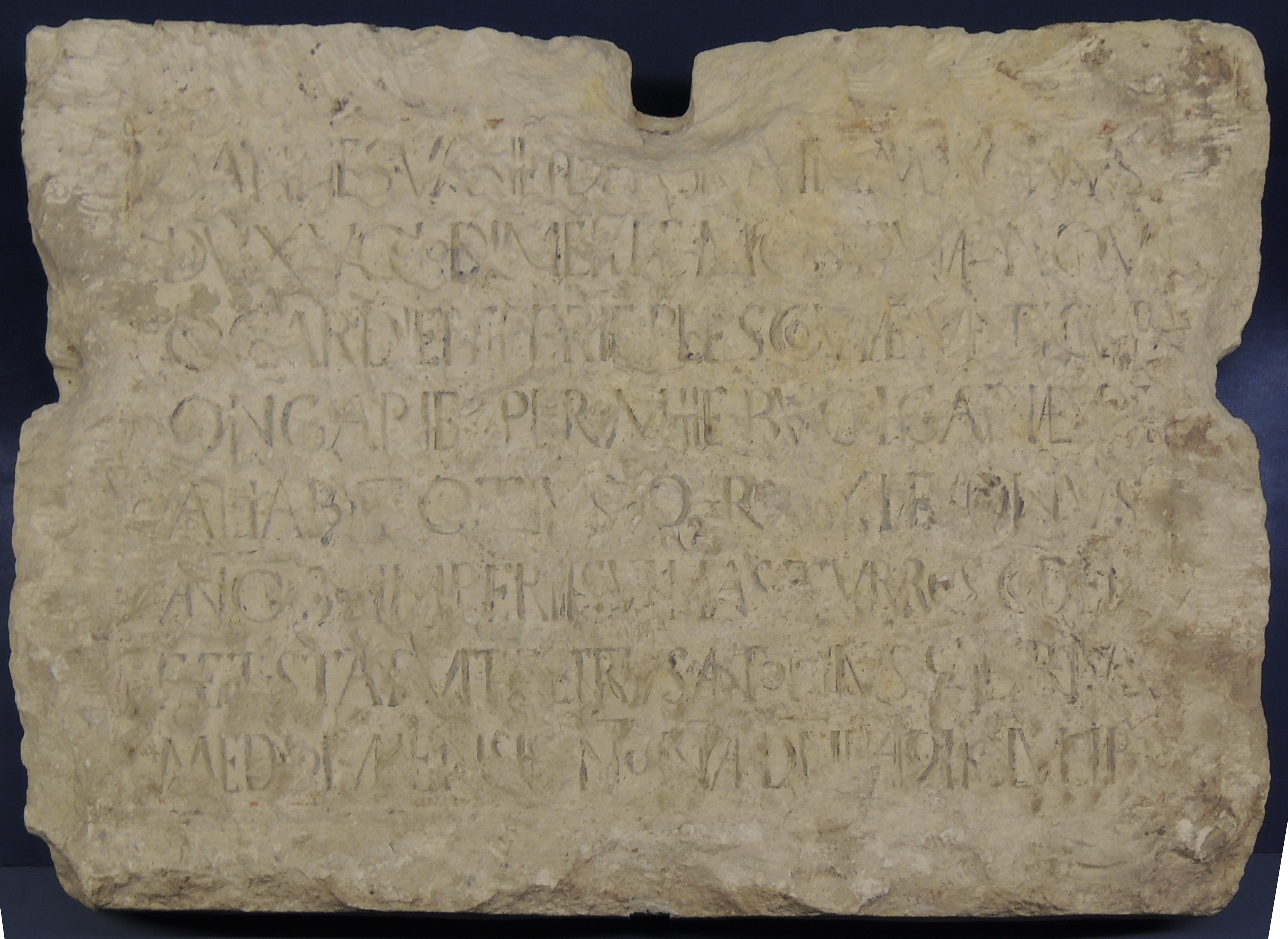 В Музеях Московского Кремля находится строительная плита белого камня со Спасской башни Кремля, относящаяся к 1491 году. На ее лицевой стороне вырезан латинский текст, гласящий: «Иоанн Васильевич, Божьей милостью великий князь Владимирский, Московский, Новгородский, Тверской, Псковский, Вятский, Югорский, Пермский, Булгарский и других земель, и государь всей России, в 30-й год своего правления повелел соорудить эти башни, и [их] построил миланец Петр Антоний Соларий, в 1491 году от воплощения Господня в мартовские календы приказав заложить». Плита была вмонтирована во время грандиозной перестройки Кремля, затеянной Иваном III.